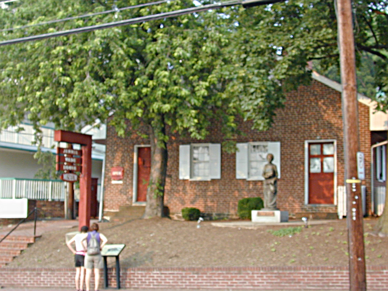 Jenne Wade House, Gettysburg Pennsylvania